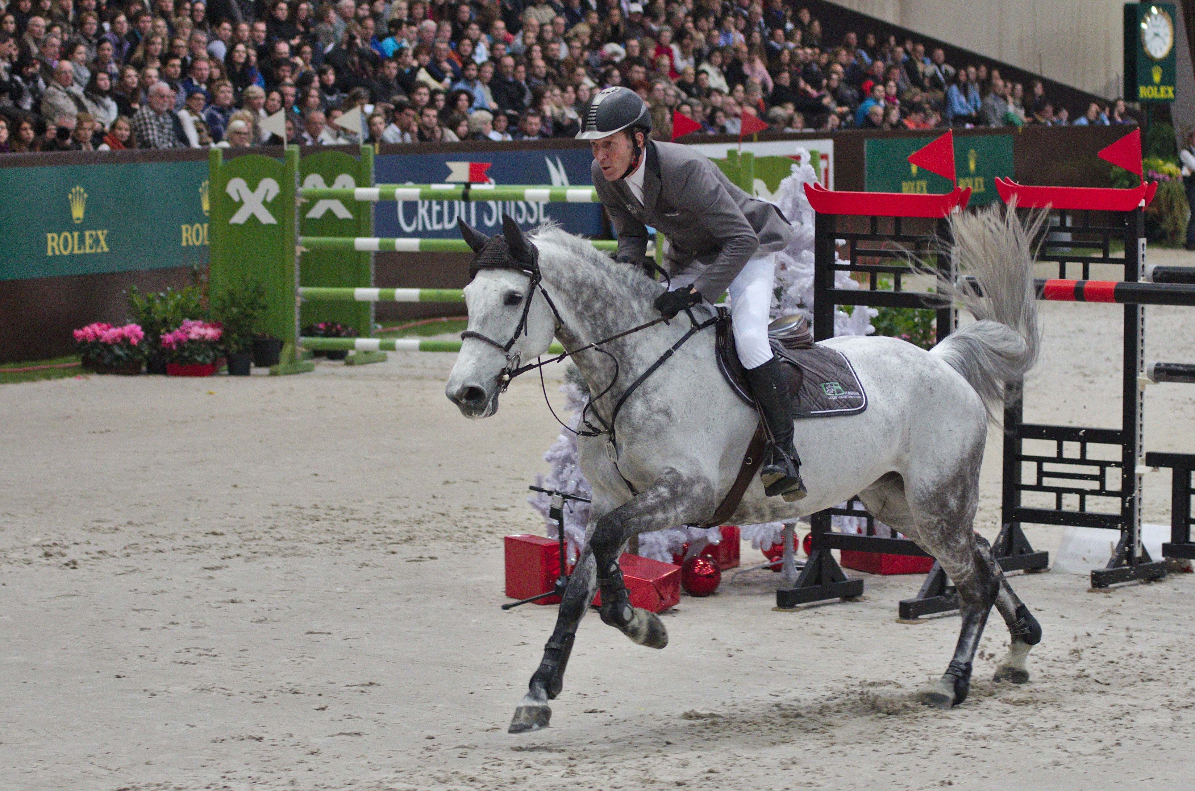 CHI Genève 2013 - 20131215 - Ludger Beerbaum et Chiara 222